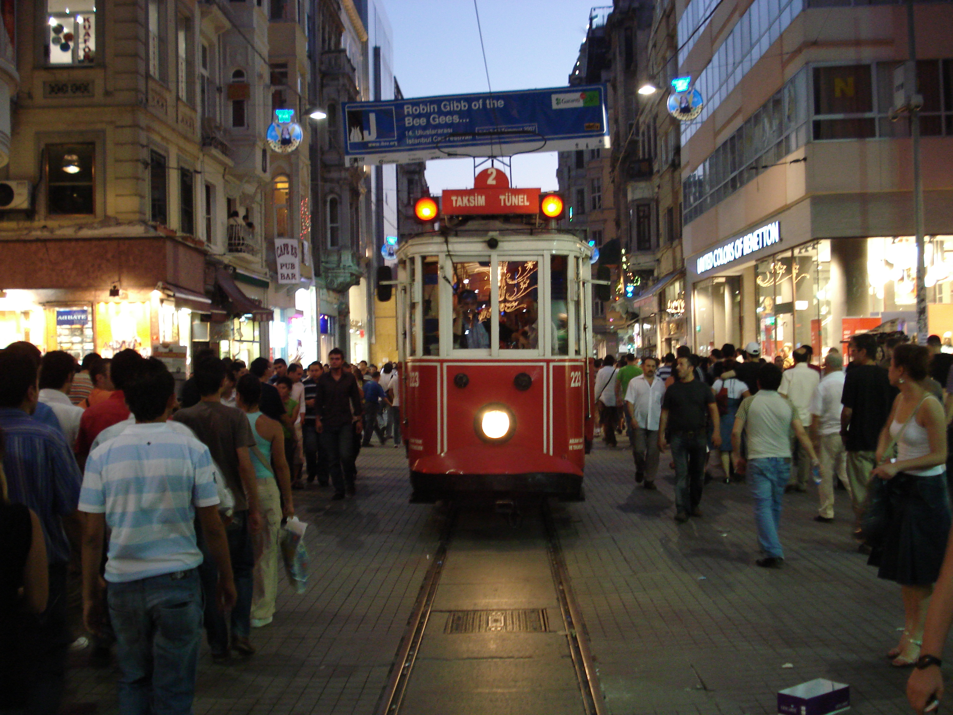 Tramway on the İstiklal Street in Beyoğlu, İstanbul